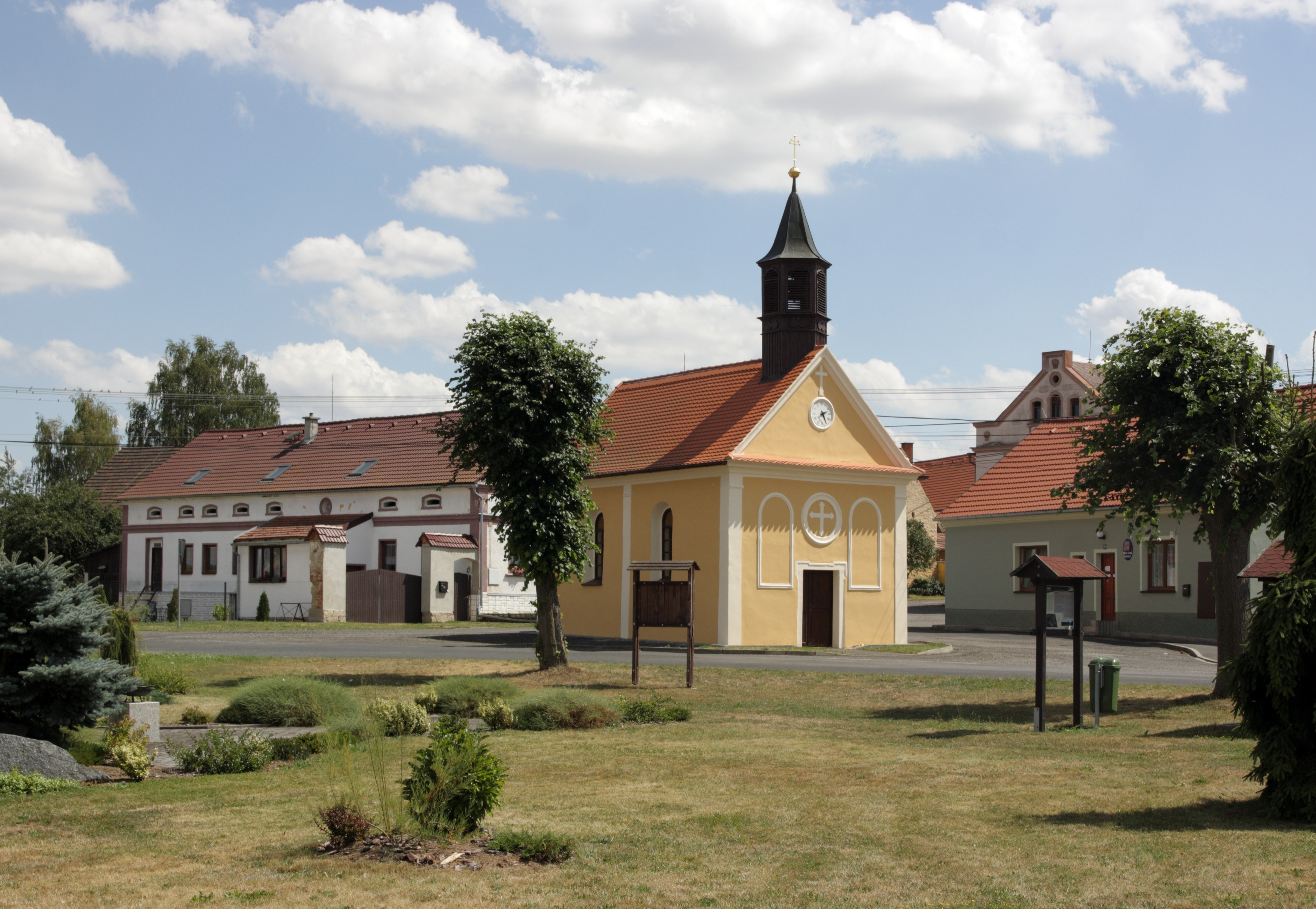 Mezholezy (dříve okres Horšovský Týn) - náves od SZ.